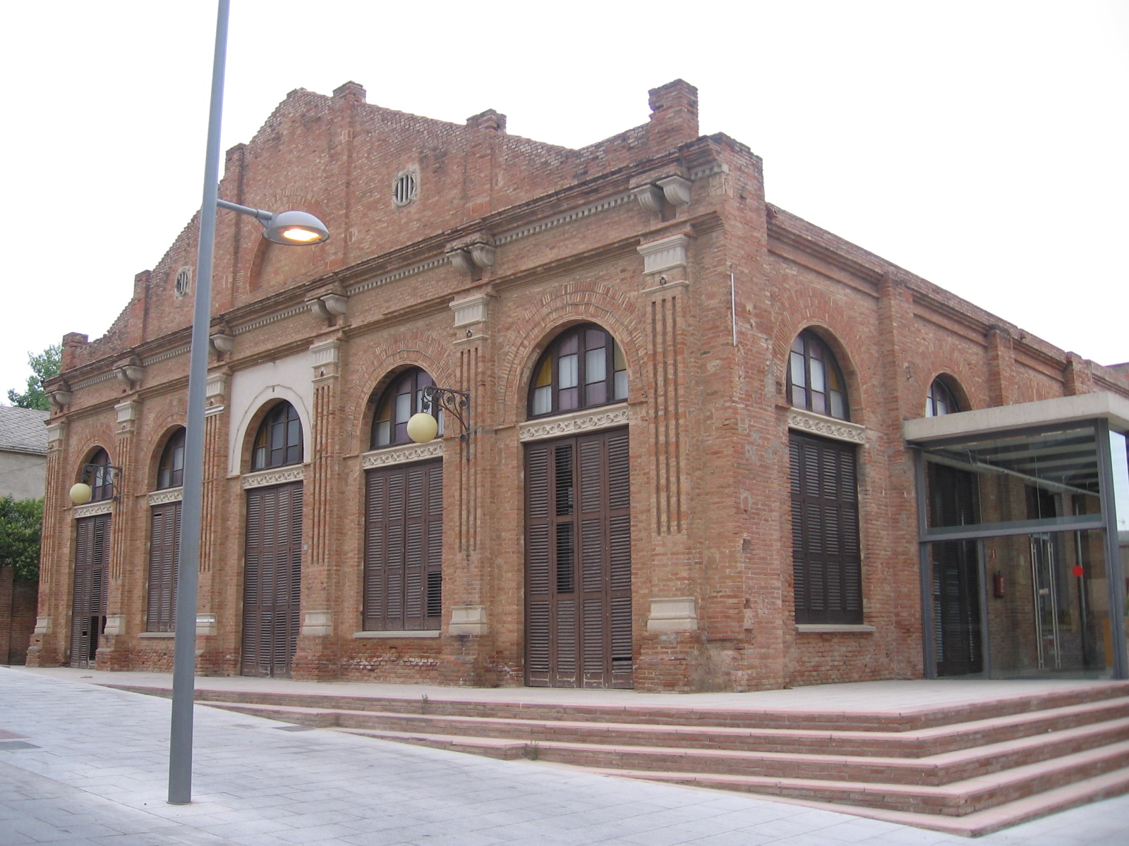 La Patronal